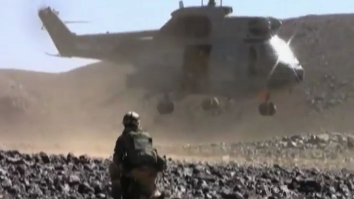 Hélicoptère Puma et militaire français dans l'Adrar des Ifoghas au Mali, vers février ou mars 2013.